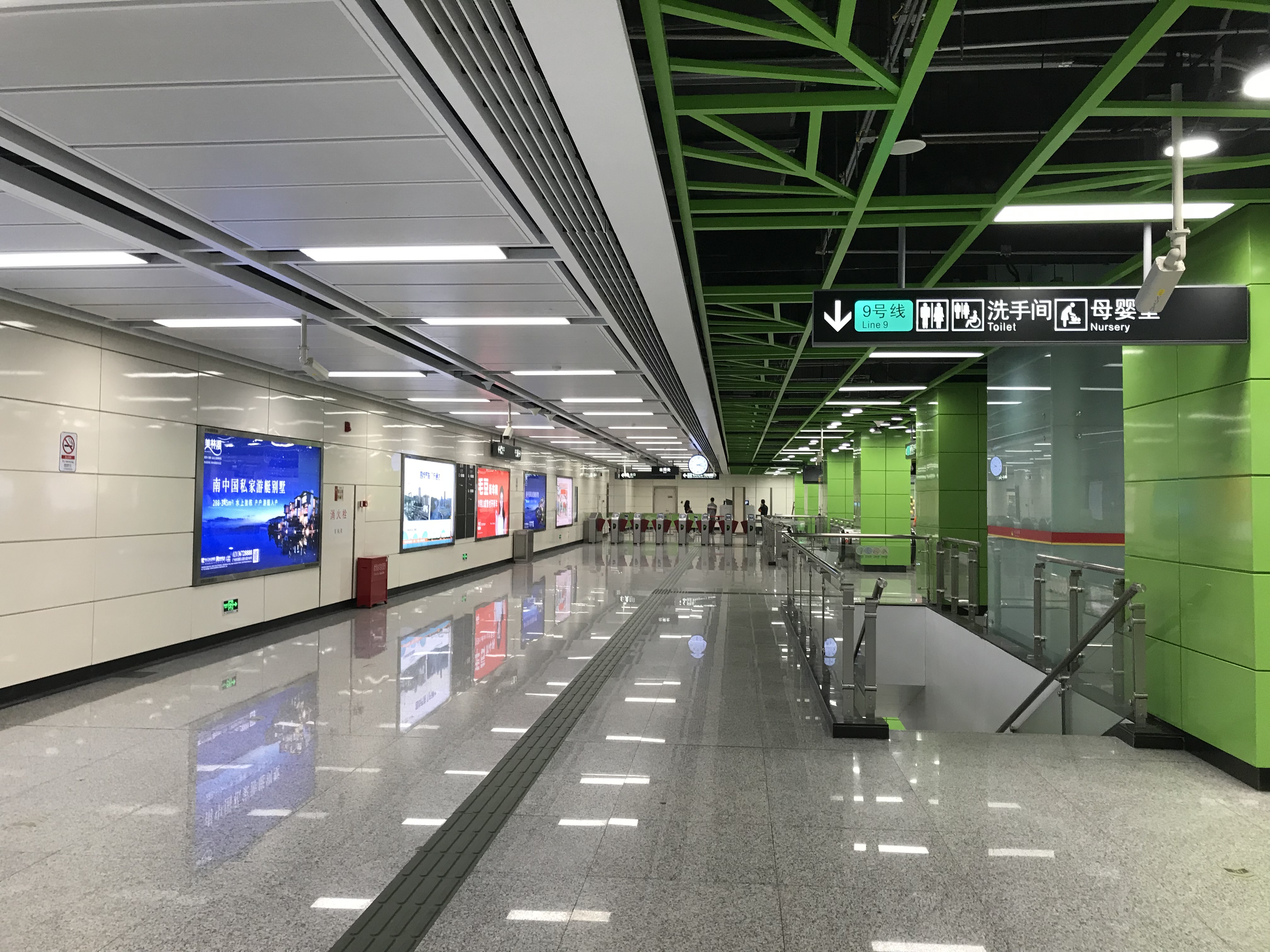 广州地铁花果山公园站